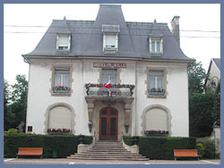 hotel de ville de sain-max